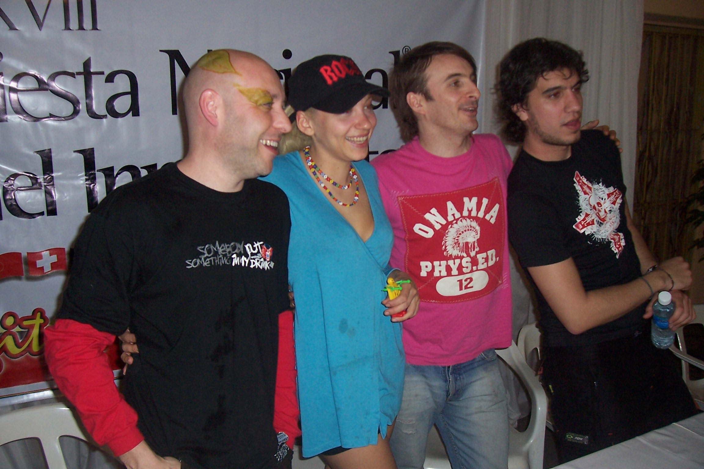 El grupo argentino Lourdes brindando una conferencia de prensa en la Fiesta Nacional del Inmigante, Oberá, Misiones.